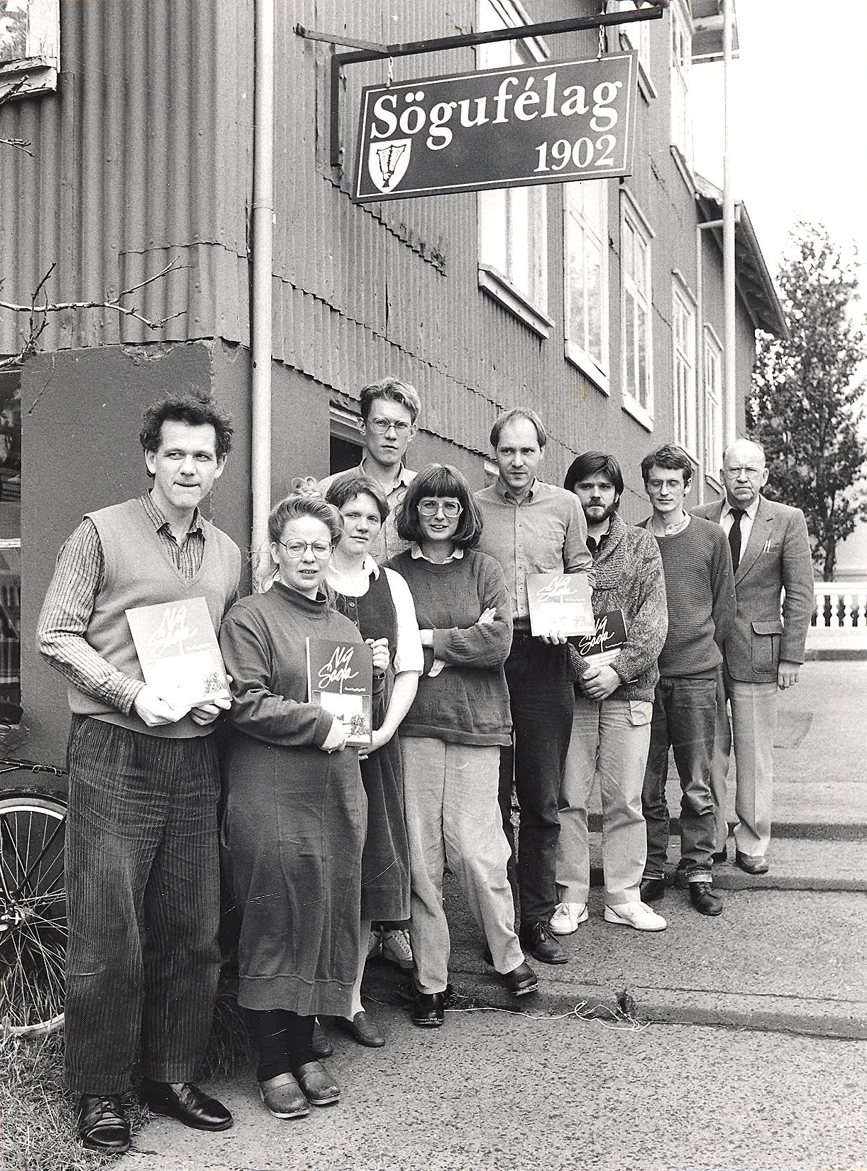 Sögufélag í Fischersundi